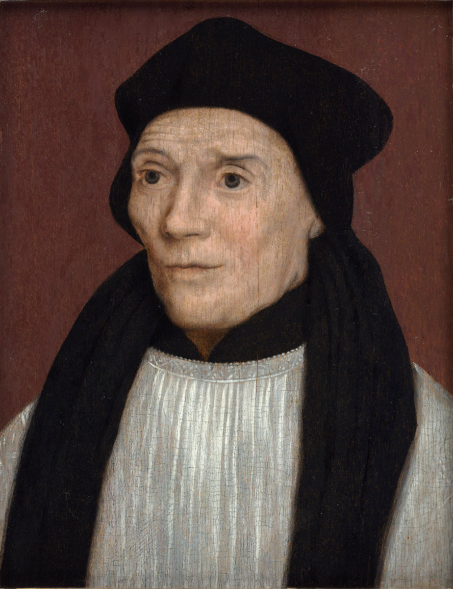 John Fisher, by Hans Holbein the Younger